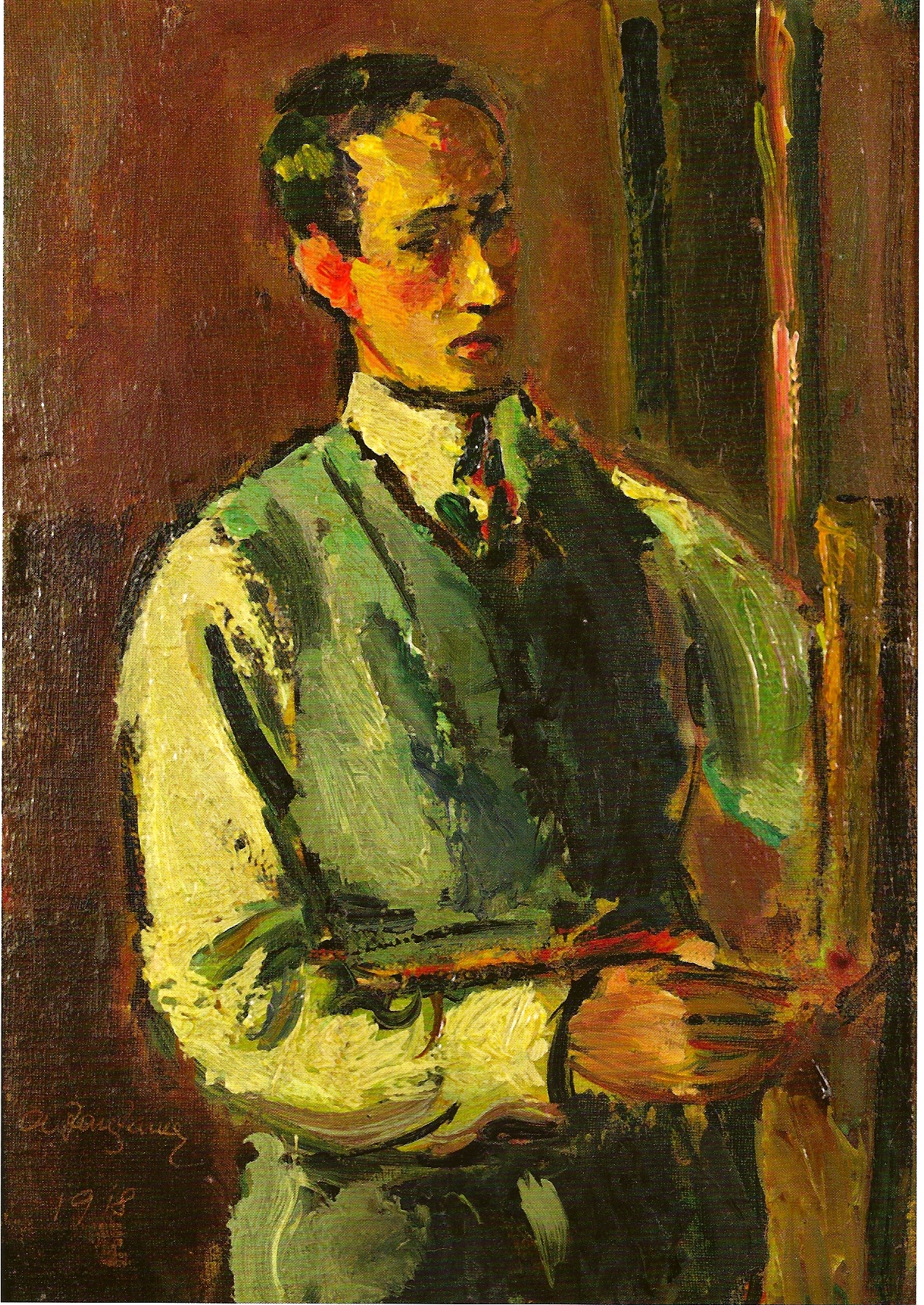 Self-portrait